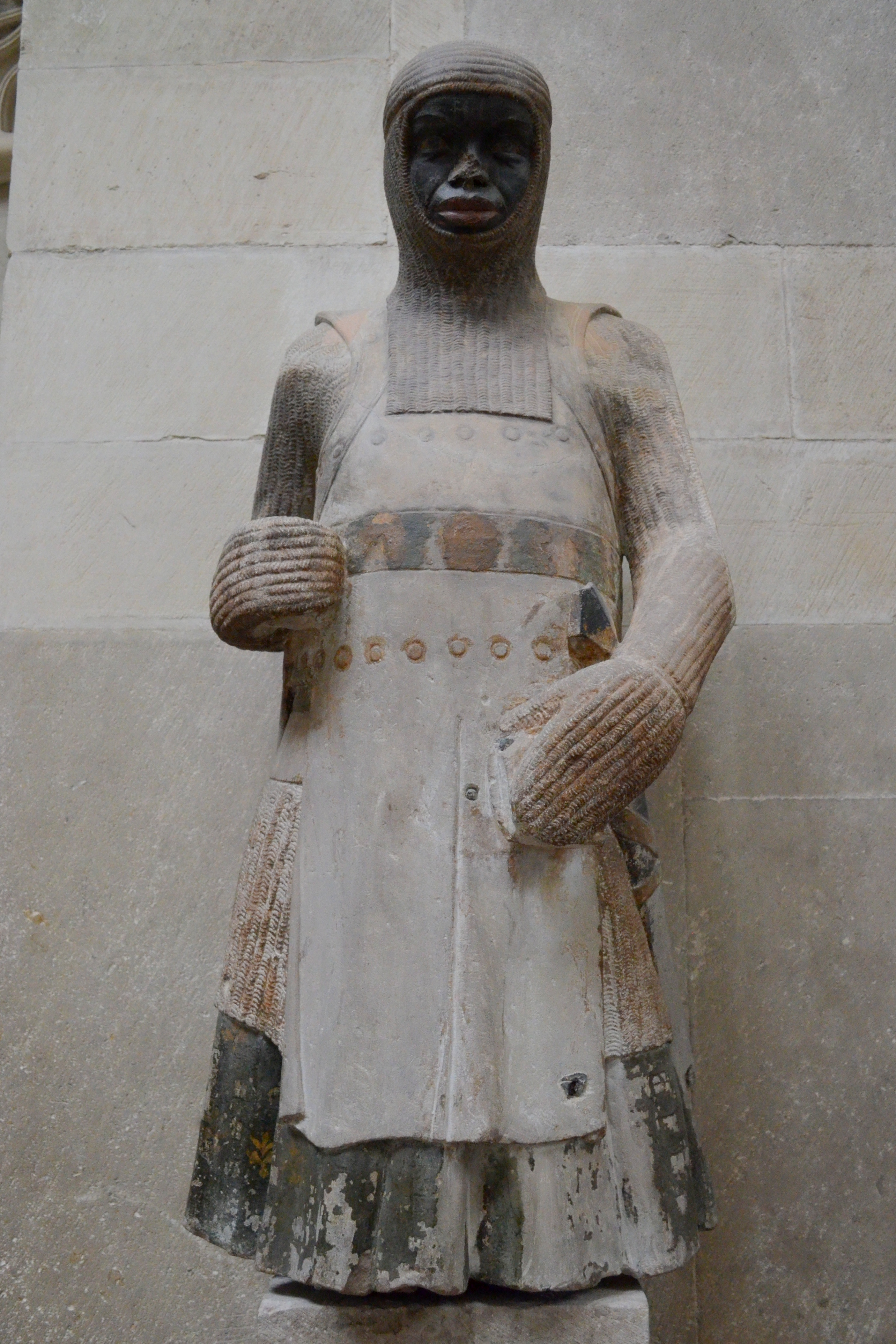 Maagdenburg, domkerk, beeld van Mauritius